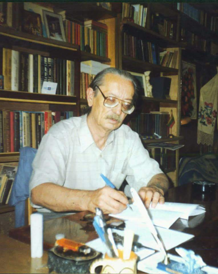 Іван Низовий у кабінеті на кв. Зарічному Луганська